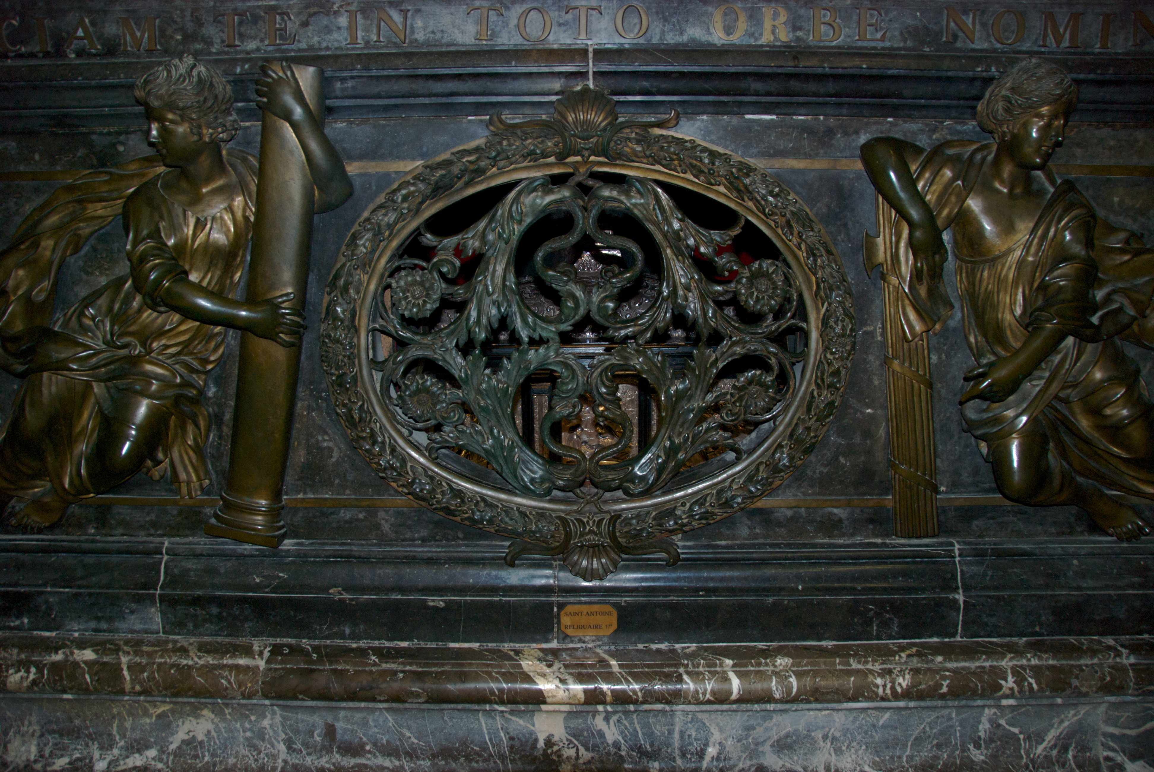 Chasse contenant les reliques de saint Antoine (Rhone-Alpes, FR)